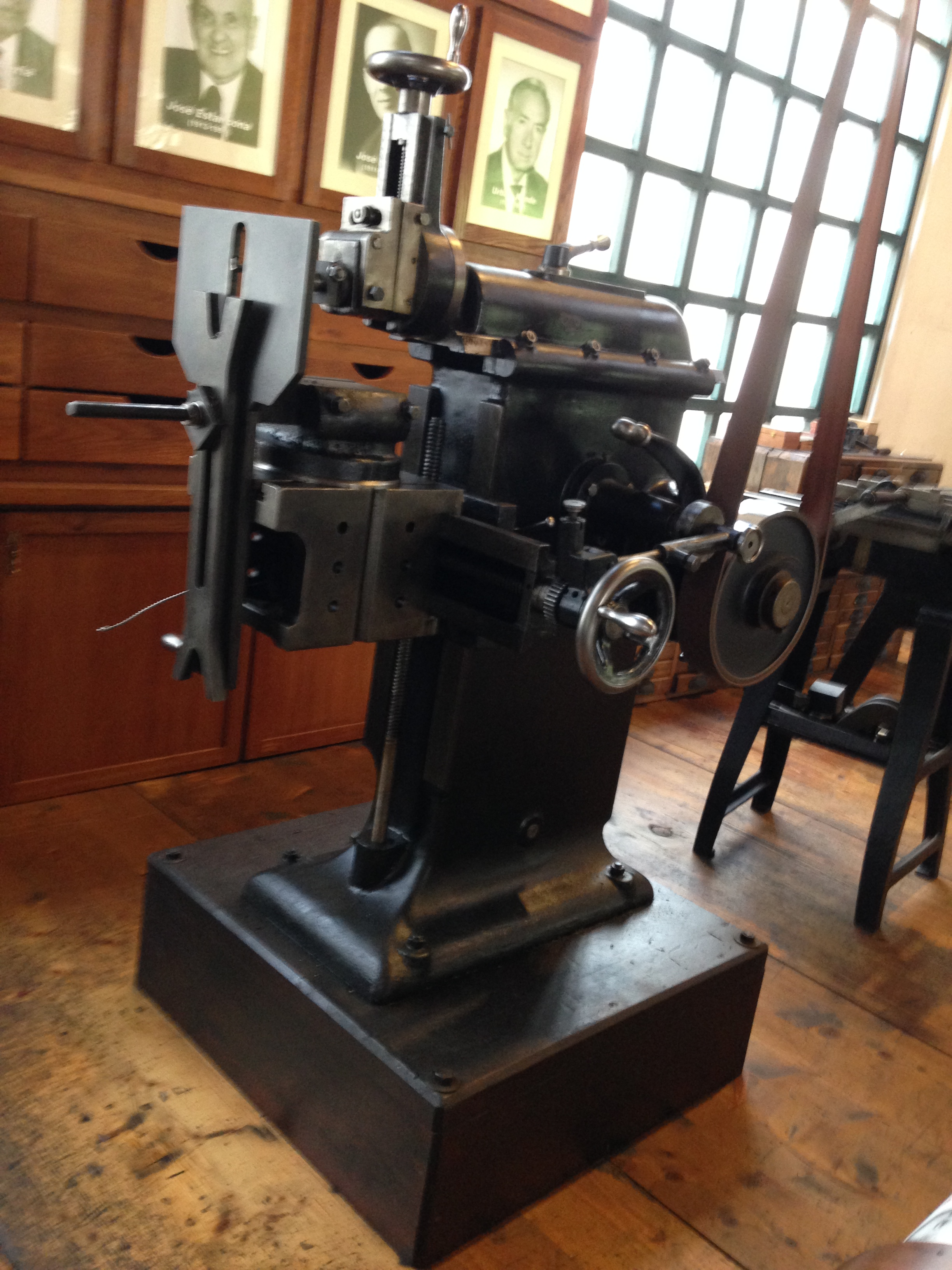 Museo de la maquina herramienta de Elgoibar (Gipuzkoa) País Vasco (España)